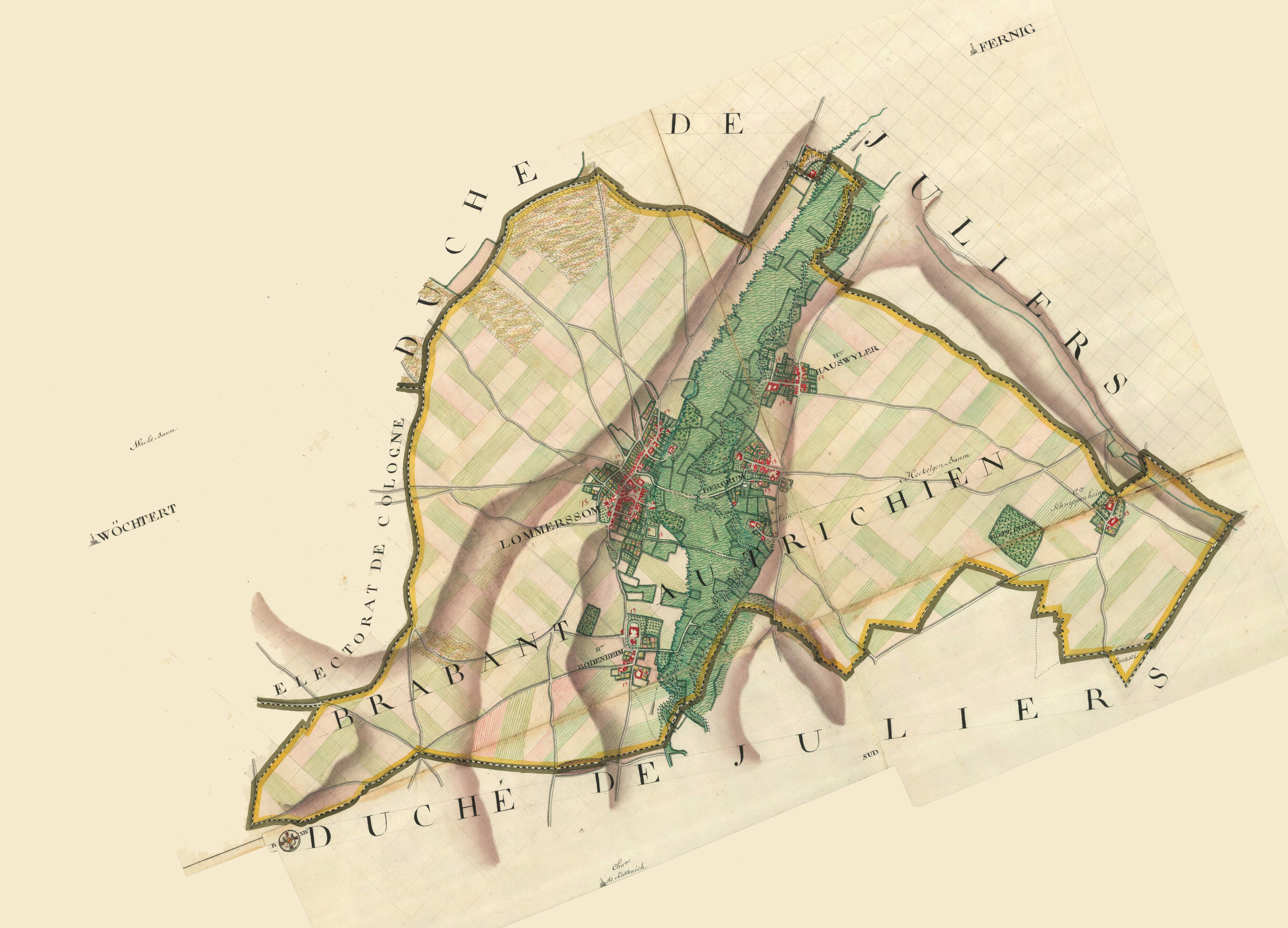 Auschnitt von Lommersum aus der Cartes de Ferraris, 1771-1777